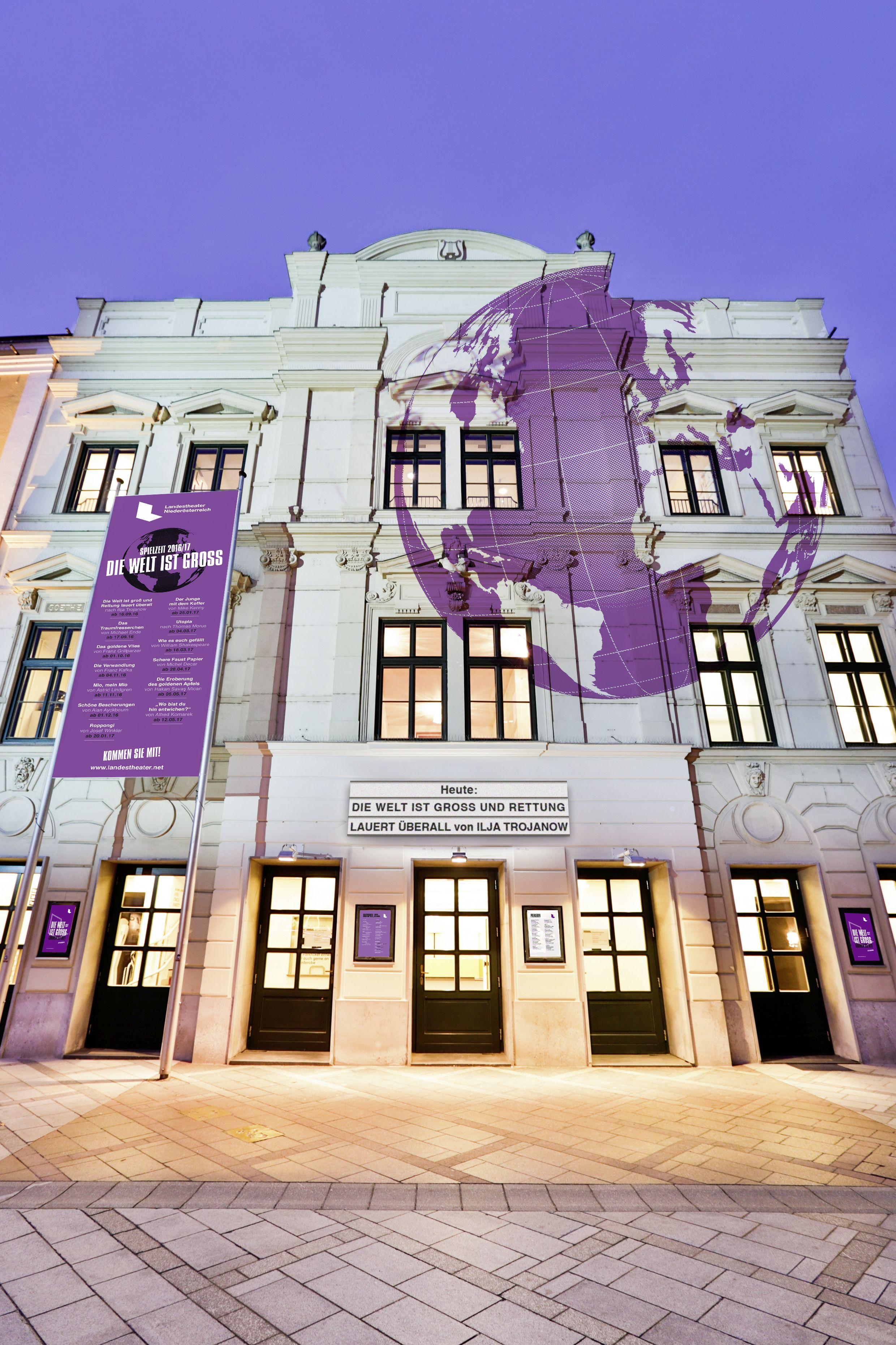 Vorderseite des Landestheaters Niederösterreich am Rathausplatz in der Landeshauptstadt St. Pölten